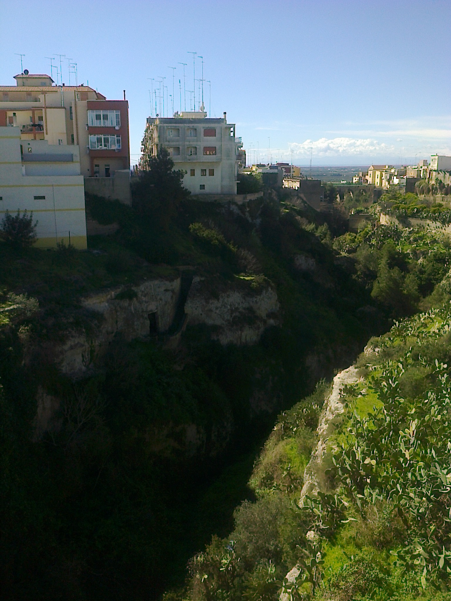 Gravina San Marco a Massafra